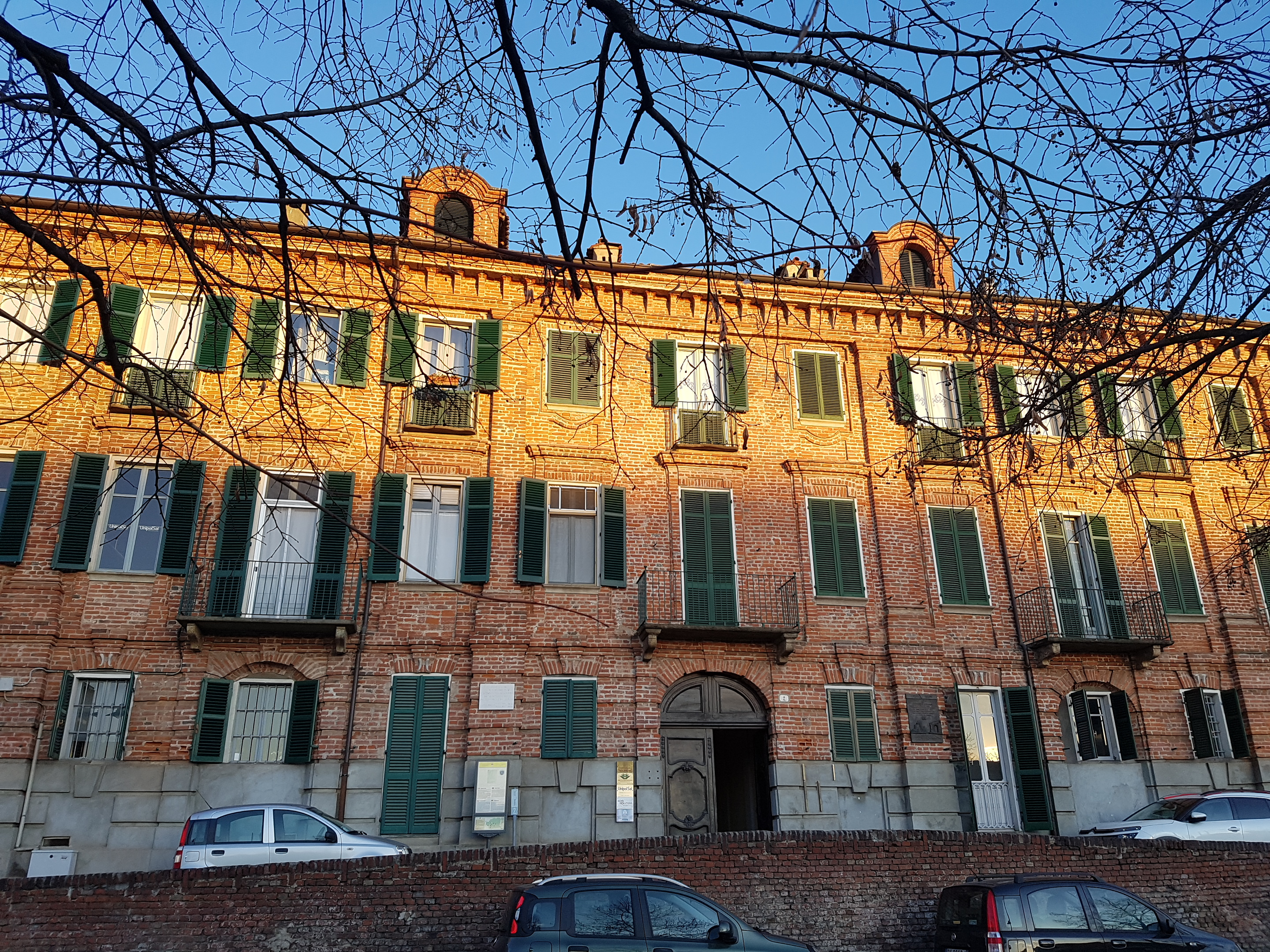 Palazzo Tesio (sec. XVIII), Chivasso, Piemonte